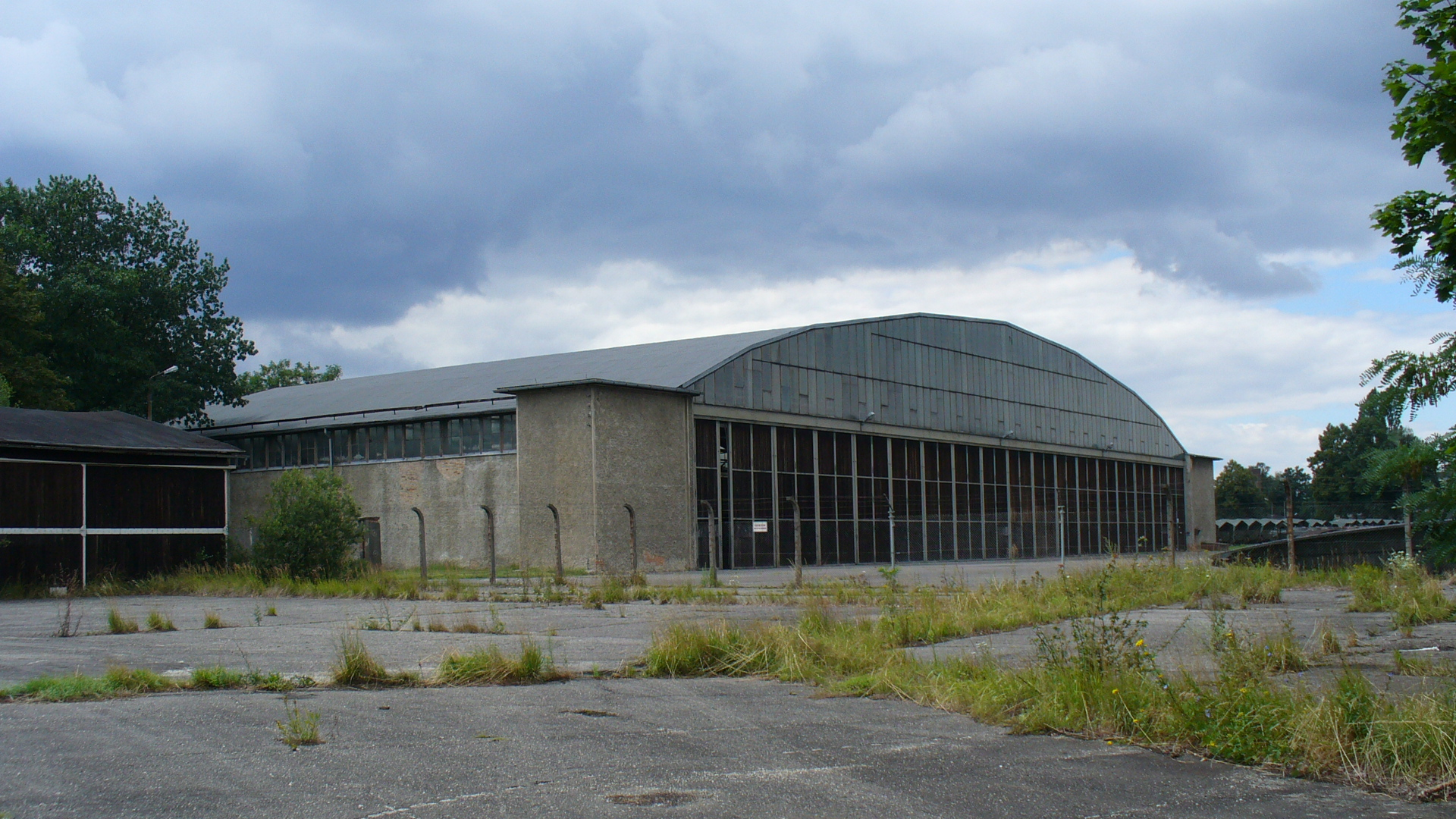 Hangar przy lotnisku w Polskiej Nowej Wsi (Fliegerhorst Neudorf)